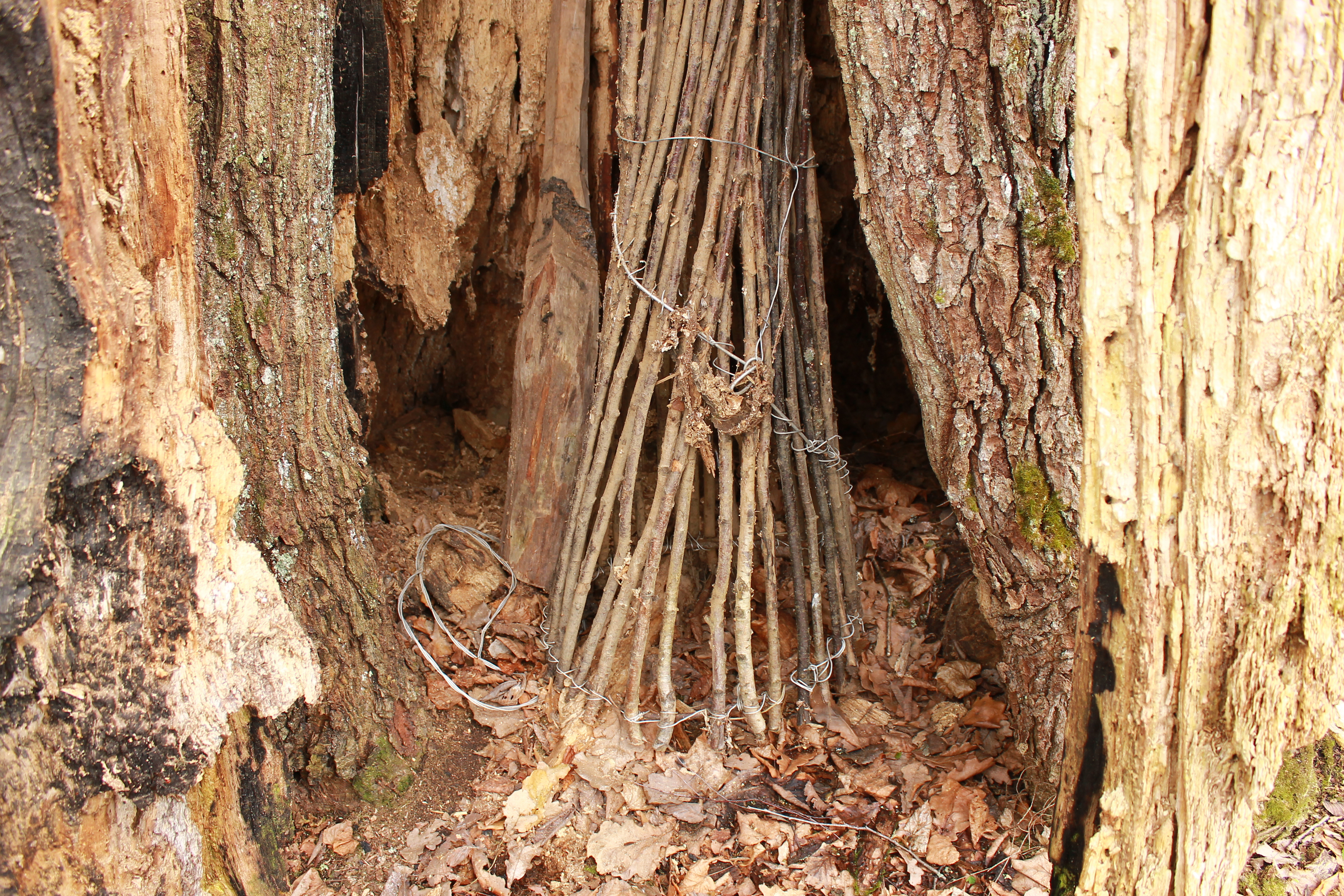 Морда, изготовленная из ивовых прутьев, спрятанная в дупле дерева